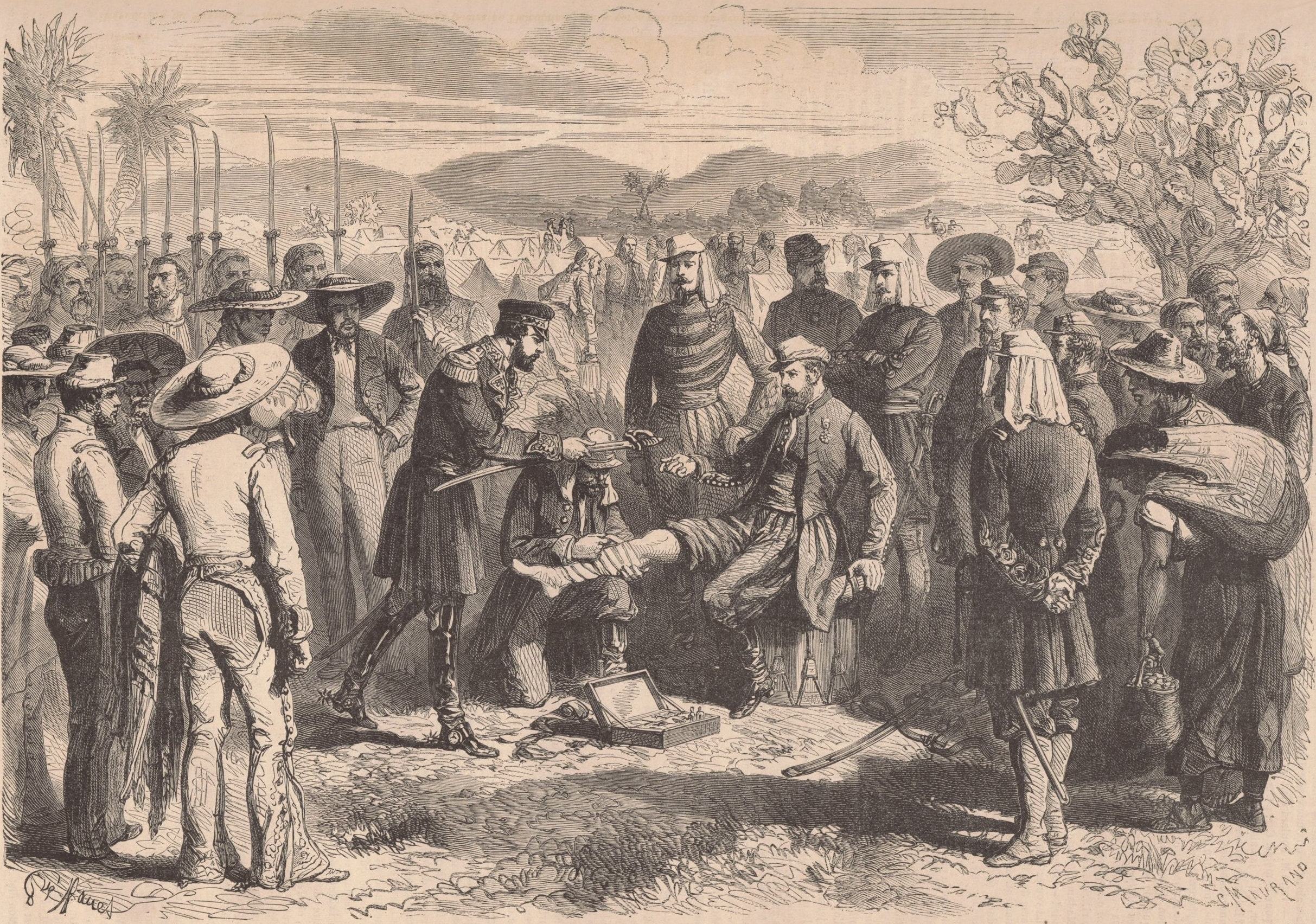 Expédition du Mexique. — Victoire d'Uquilpan, remportée par le colonel Clinchant, du 2e zouaves, sur les généraux Juaristes Arteaga, Echegueray, Neri et Espinola. (Ce dernier remet son épée au Colonel Clinchant, atteint d'une balle à la jambe) (D'après le croquis de M. Maynard.).